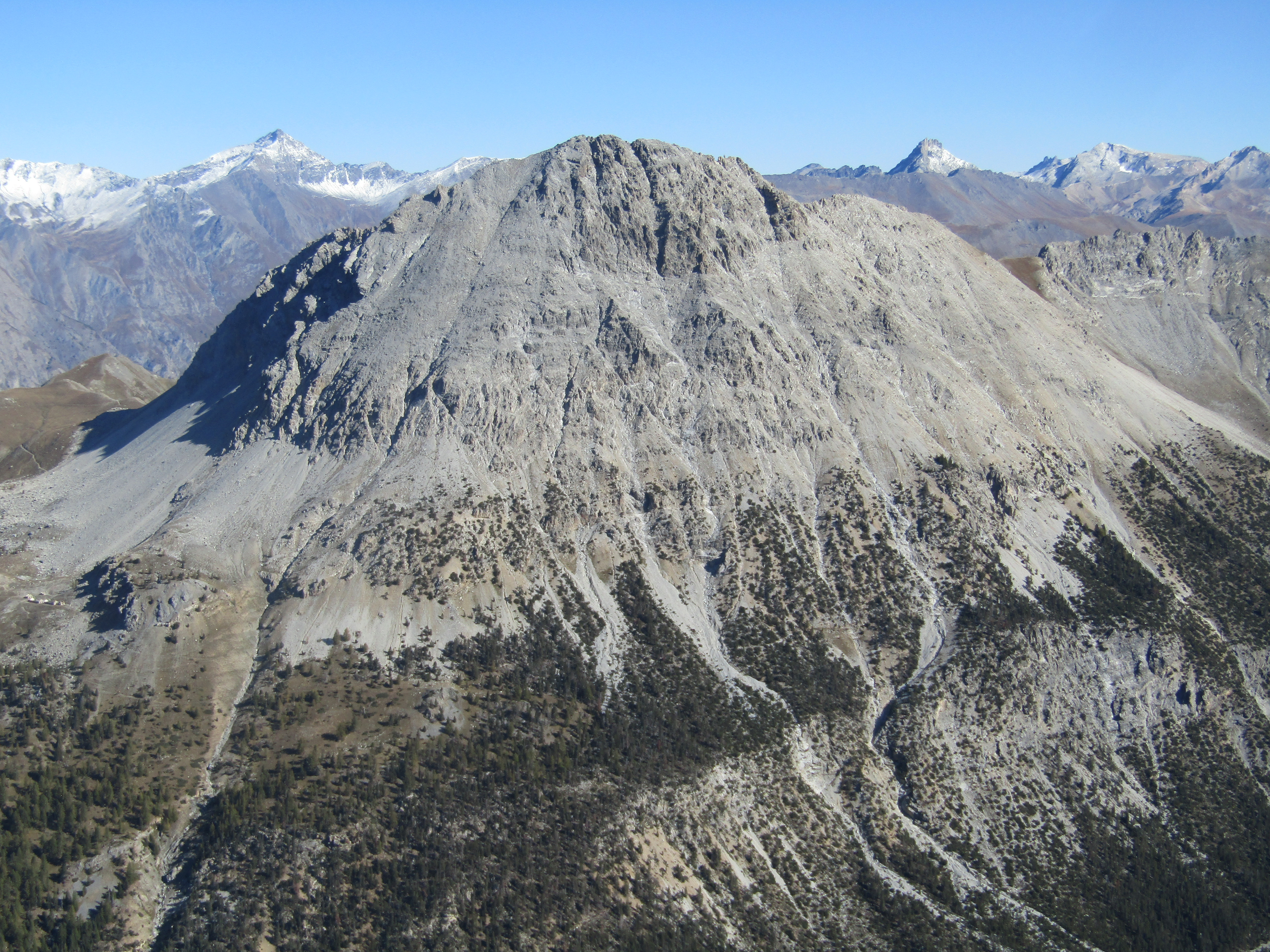 La Punta Charrà dalla Pointe de Pécé (Alpi Cozie, Francia)